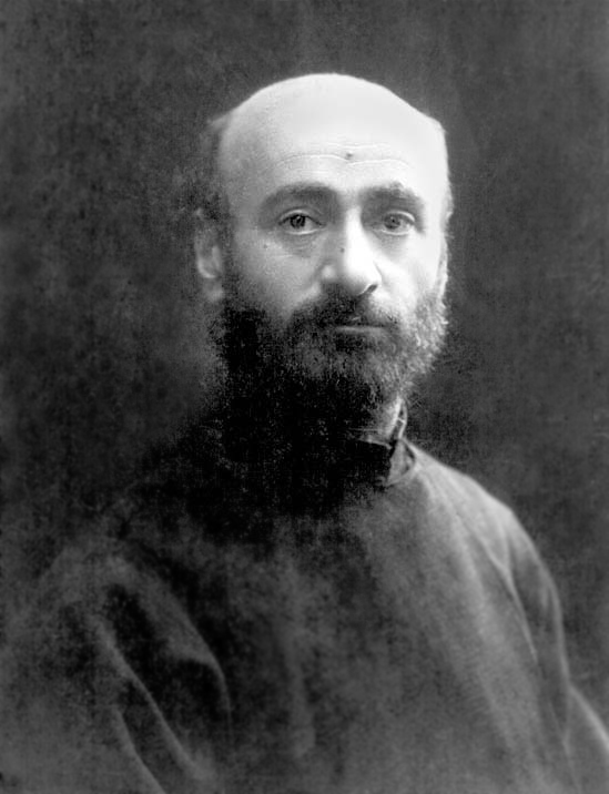 Фотопортрет Комитаса